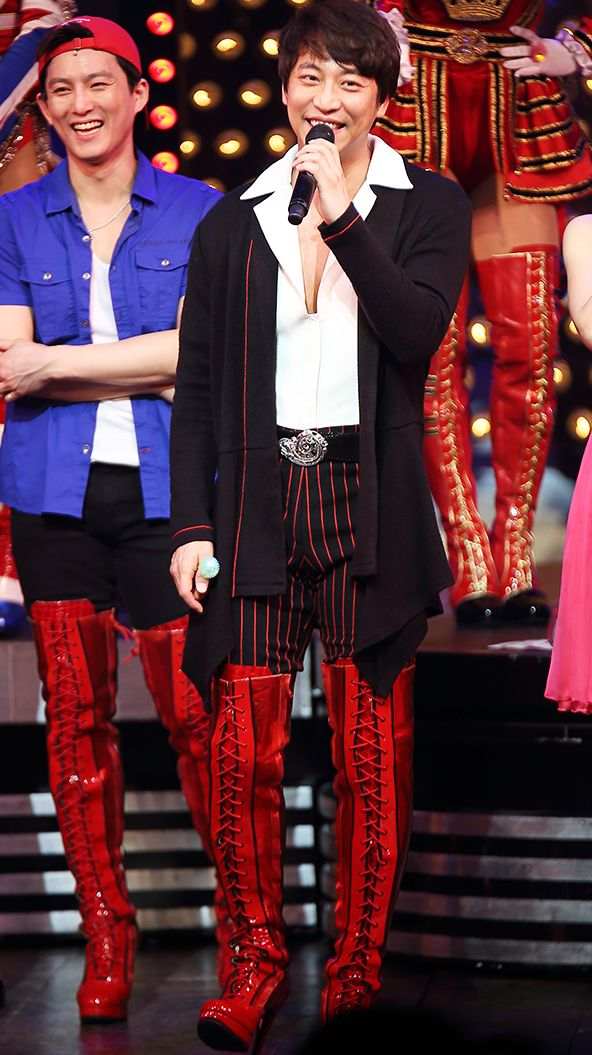 2016.11.13《Kinky Boots》謝幕